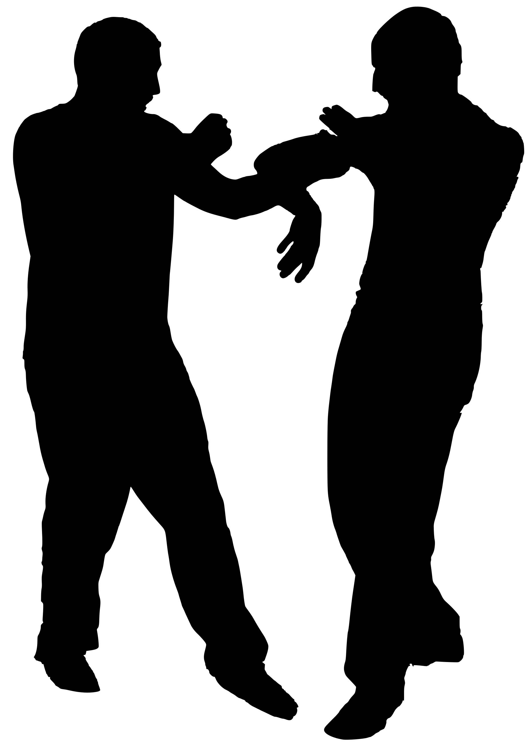 wing chun bong wu outline